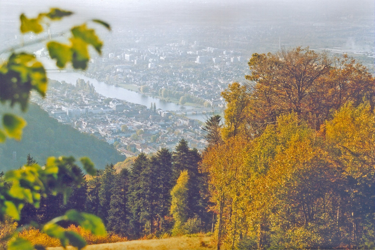 Blick auf Altstadt, Neuenheim und Bergheim